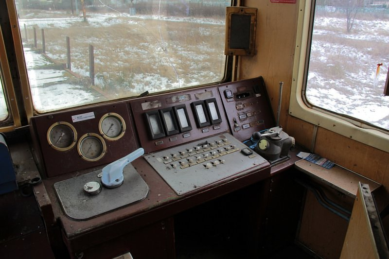 Kabina elektrycznego zespołu trakcyjnego EW58-028.